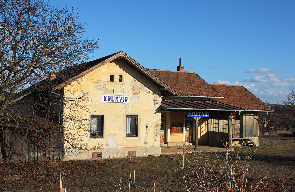 Železniční zastávka Krumvíř na trati 256 Čejč - Žďánice